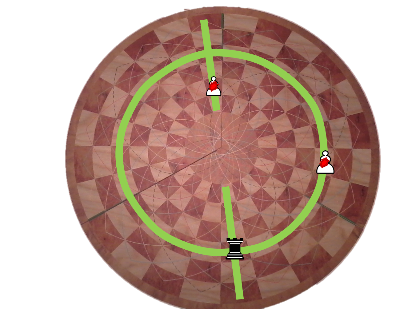 קובץ שלי אבל משותף. תהנו!